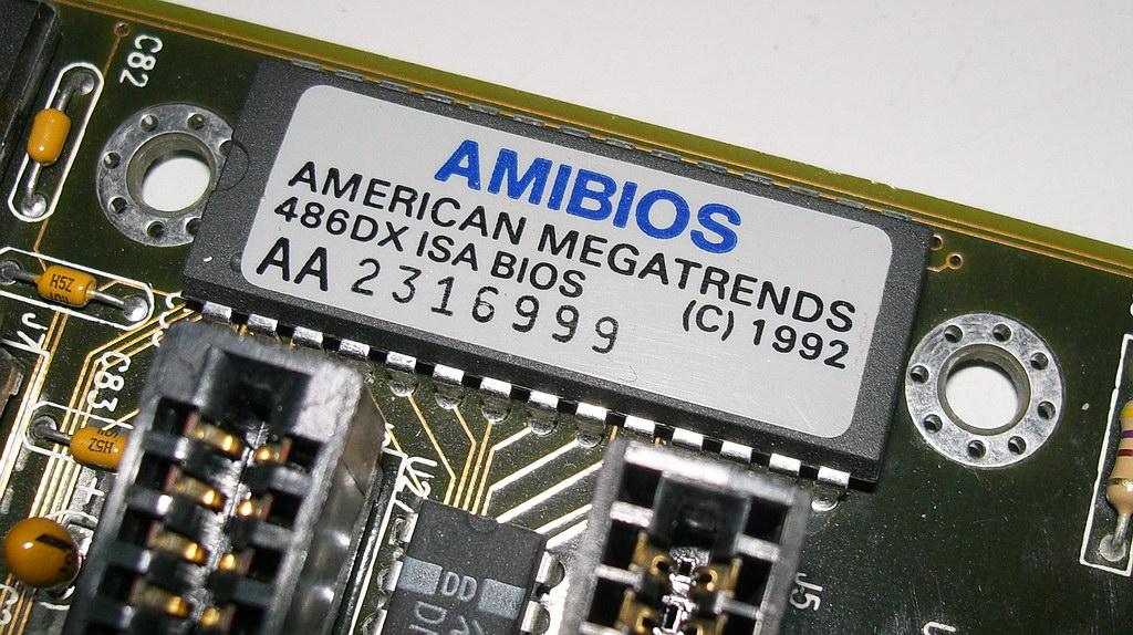 AMIBIOS ROM-Chip 486DX ISA BIOS von 1992